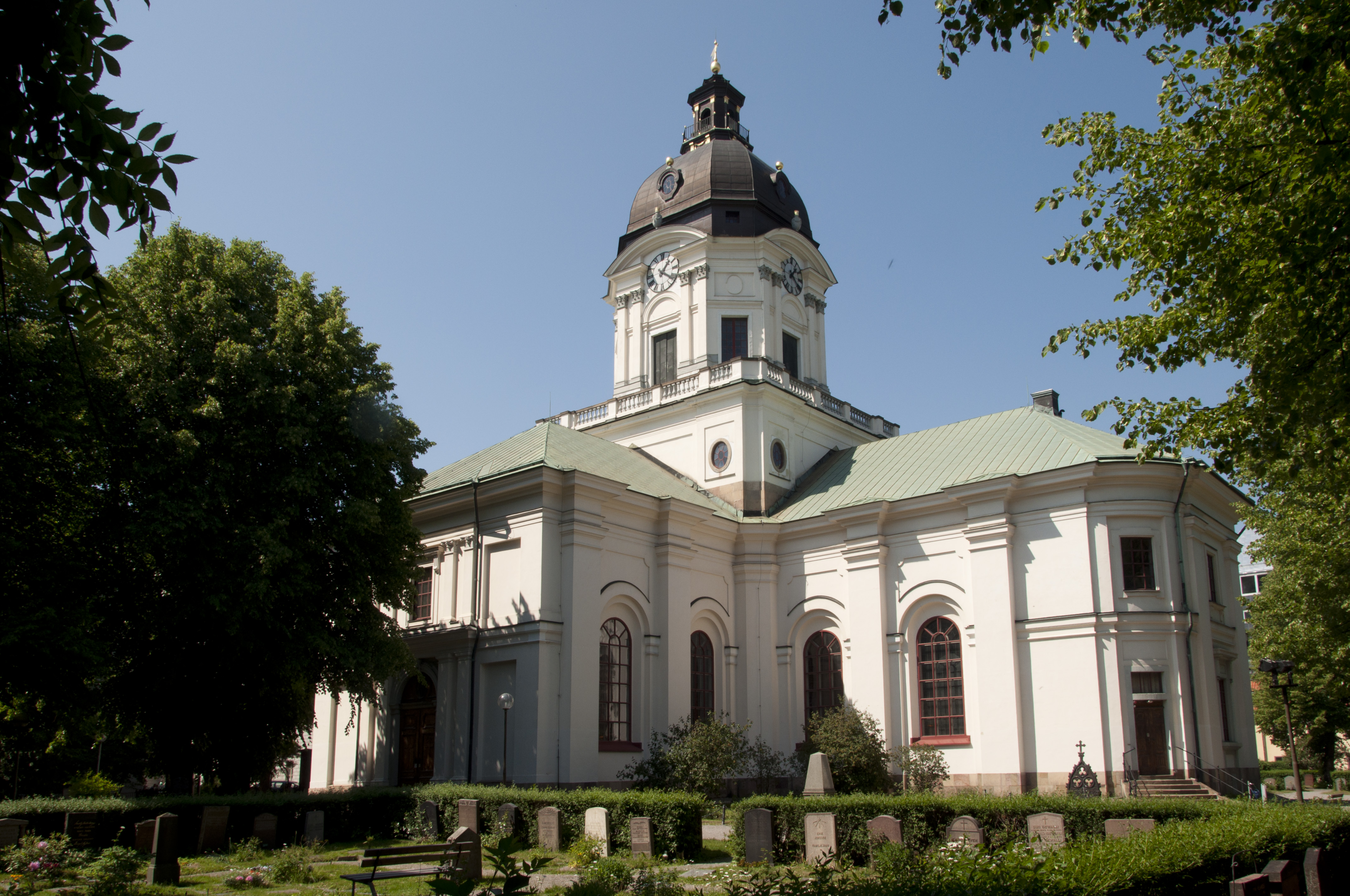 Adolf Fredriks kyrka